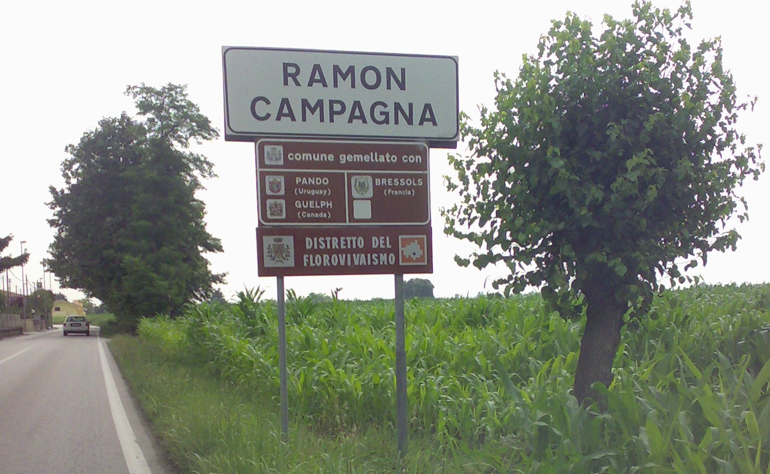 Ramon Campagna, nei pressi di Ramon